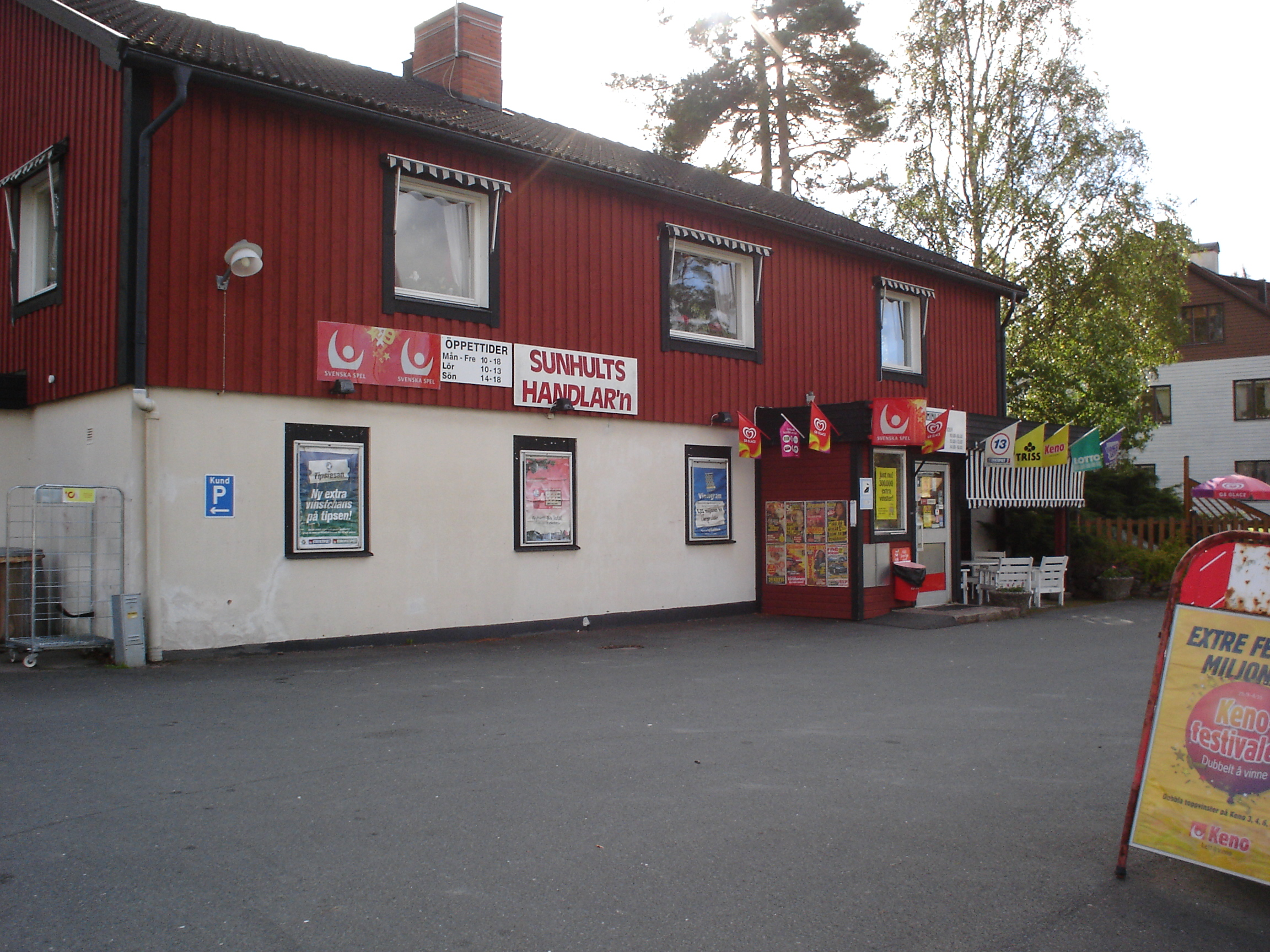 Butik i Sunhultsbrunn